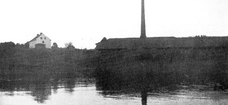 Finnborgs tegelbruk, tegellada och en skorsten från tegelbränning, 1900-tal